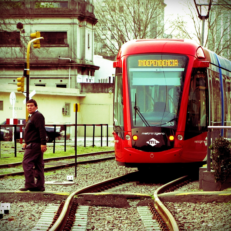 Descripción original: El Tranvía del Este o Tren del Este es una línea tranviaria moderna ubicada en el barrio de Puerto Madero de la ciudad de Buenos Aires.Fue inaugurado oficialmente el sábado 14 de julio de 2007, siendo librado al servicio público el 25 de julio siguiente. Circula en forma paralela a la Avenida Alicia Moreau de Justo, entre las avenidas Independencia y Córdoba, sobre una vía de trocha media montada paralelamente a la vía de cargas de trocha ancha que ocupan esa franja. Planes para su extensión incluyen las terminales ferroviarias de Retiro, Constitución y Buenos Aires. El sistema opera con dos coches articulados Alstom modelo Citadis 302, cedidos en comodato por la intendencia de Mulhouse, en el este de Francia. Bautizados por la Secretaría de Transporte como Celeris, cada coche cuenta con 5 módulos que se articulan en 4 fuelles, con 48 asientos fijos, más otros 16 plegables cada uno y tiene una capacidad total de 300 personas. El valor del boleto es de $1, (alrededor de 0.26 USD). Nuevas extensiones están previstas para ampliarlo 2 kilómetros hasta la terminal Terminal Retiro de ómnibus interurbanos y 5,2 kilómetros de la actual estación Independencia a Caminito en La Boca. Se propone también una nueva línea a las estaciones terminales Constitución y Buenos Aires.